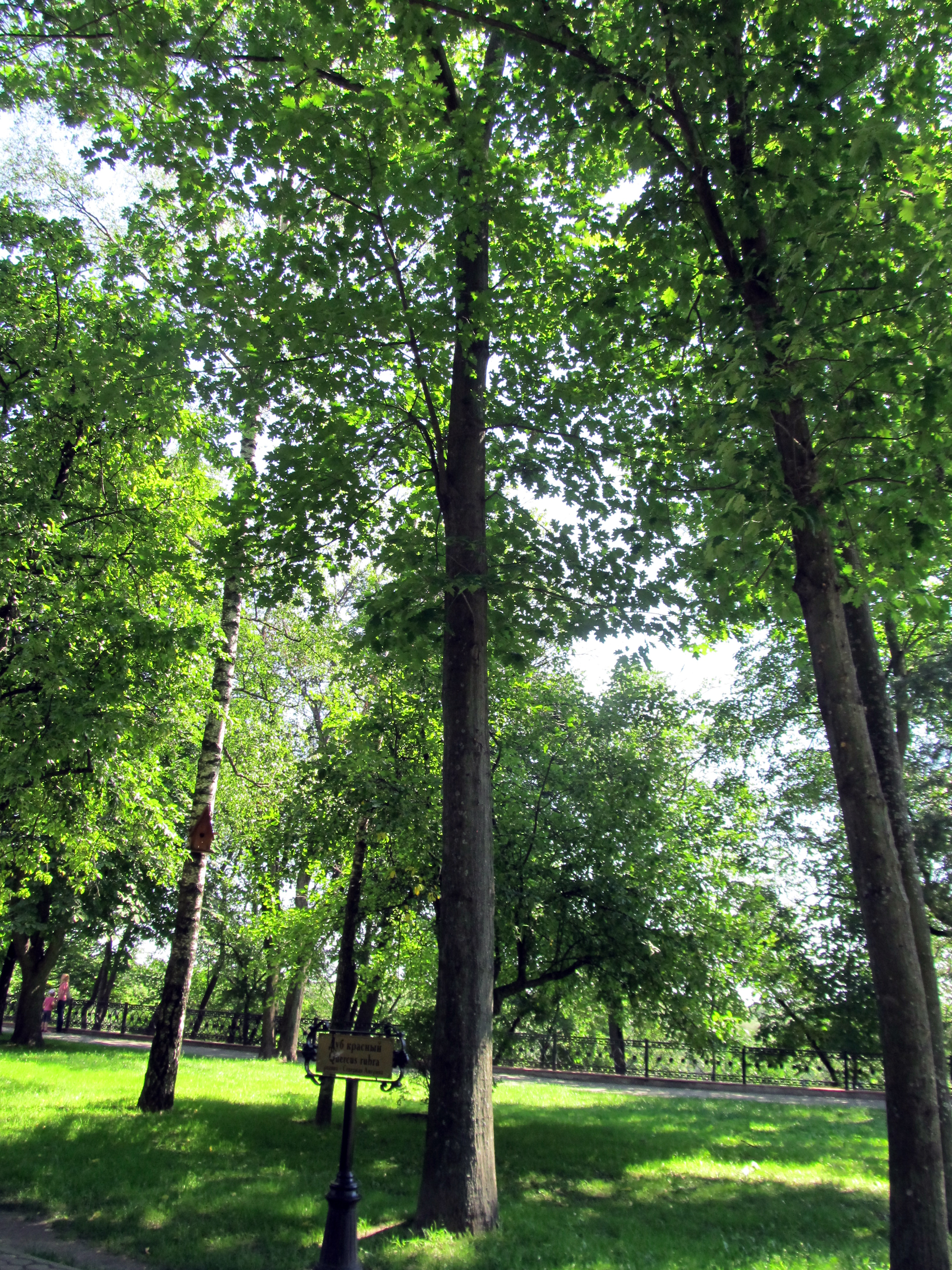 Беларуская (тарашкевіца): Палацава-паркавы ансамбаль: палац, дэкаратыўнае аздабленьне інтэр’ера вежы і цэнтральнай залі палаца, Петрапаўлаўскі сабор, капліца-пахавальня,парк. г. Гомель This is a photo of Belarusian heritage monument. Reference number: 310Г000044 ( WLM)